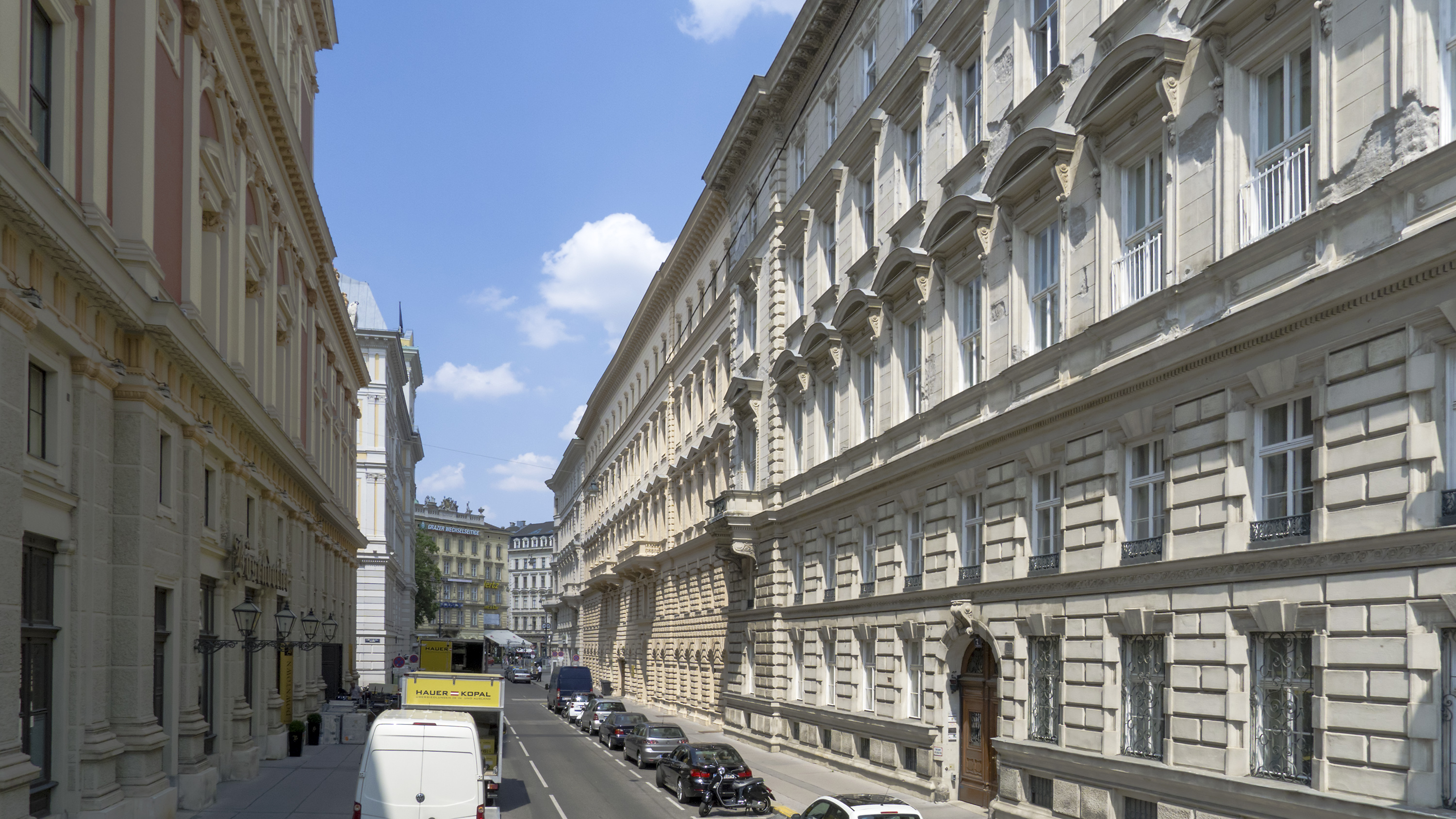 Canovagasse in Wien 1 bei Nr. 7 Richtung Norden